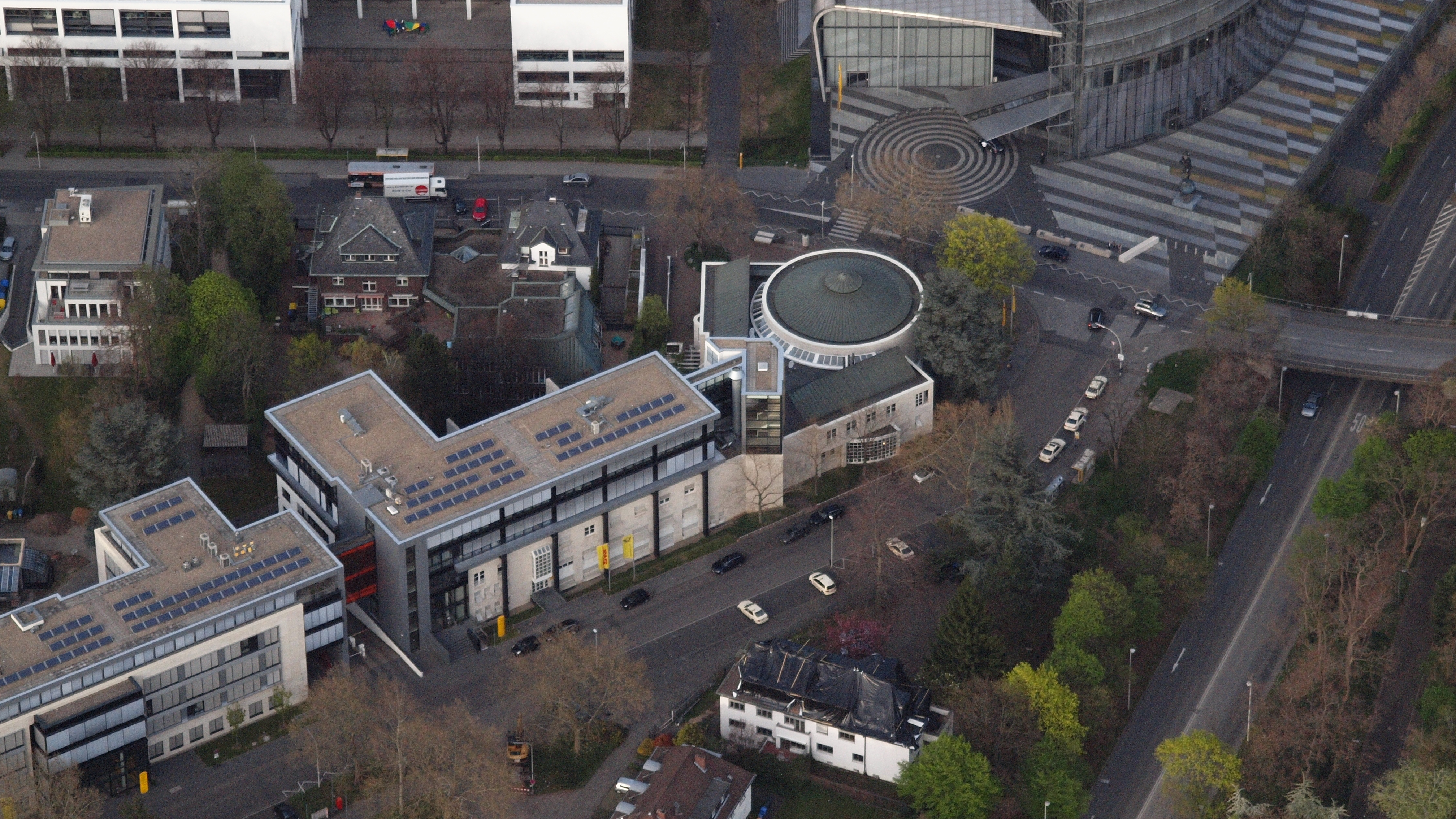 Ehemalige Landesvertretung Niedersachsen mit angebundenem Bürogebäude der Deutschen Post AG, Kurt-Schumacher-Straße 28/Fritz-Erler Straße 9–11, Bonn-Gronau: Luftaufnahme